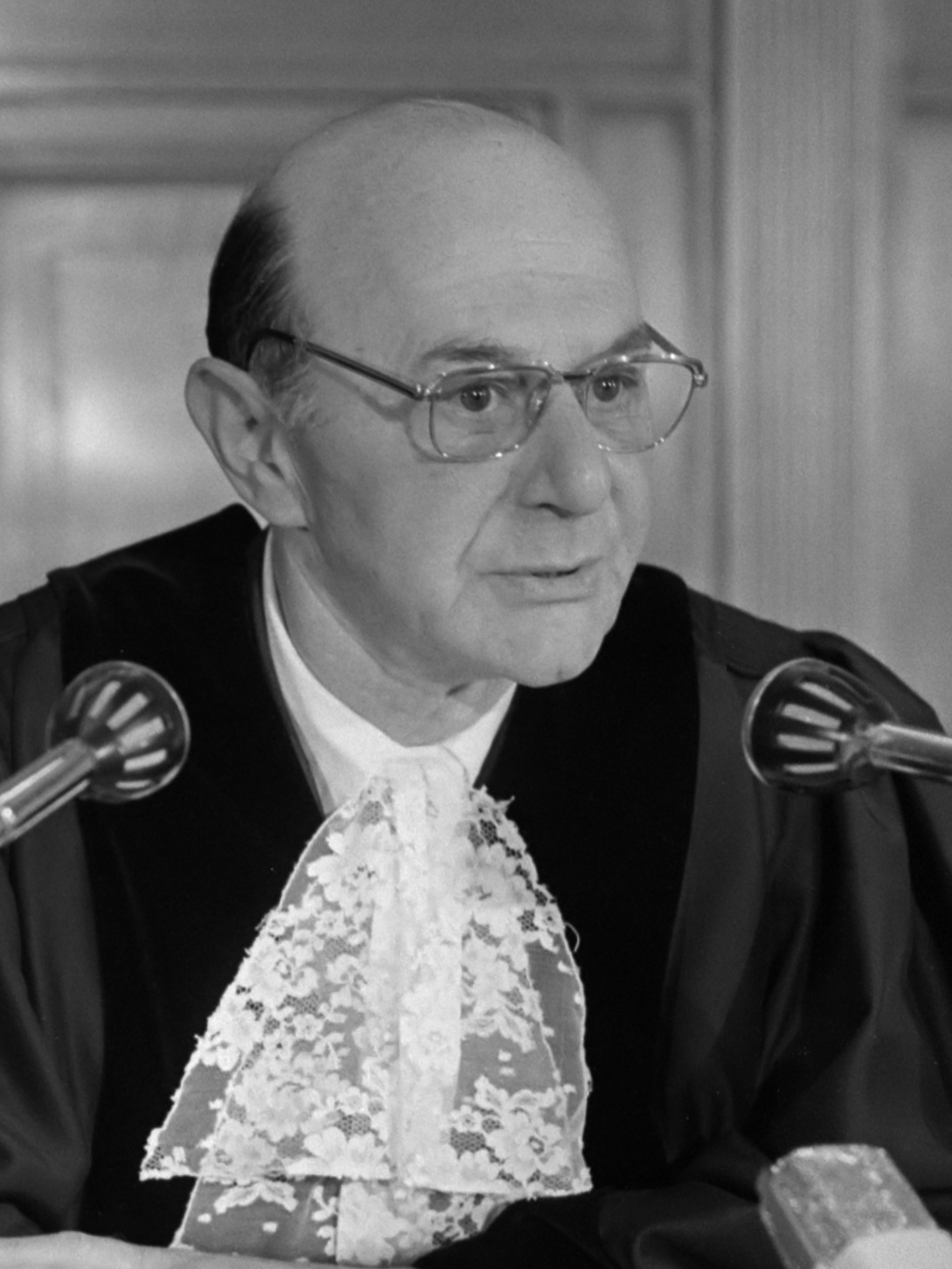 Internationaal hof van Justitie doet uitspraak in visserijgeschil tussen Engeland en IJsland, president mr. Lachs (midden) 25 juli 1974